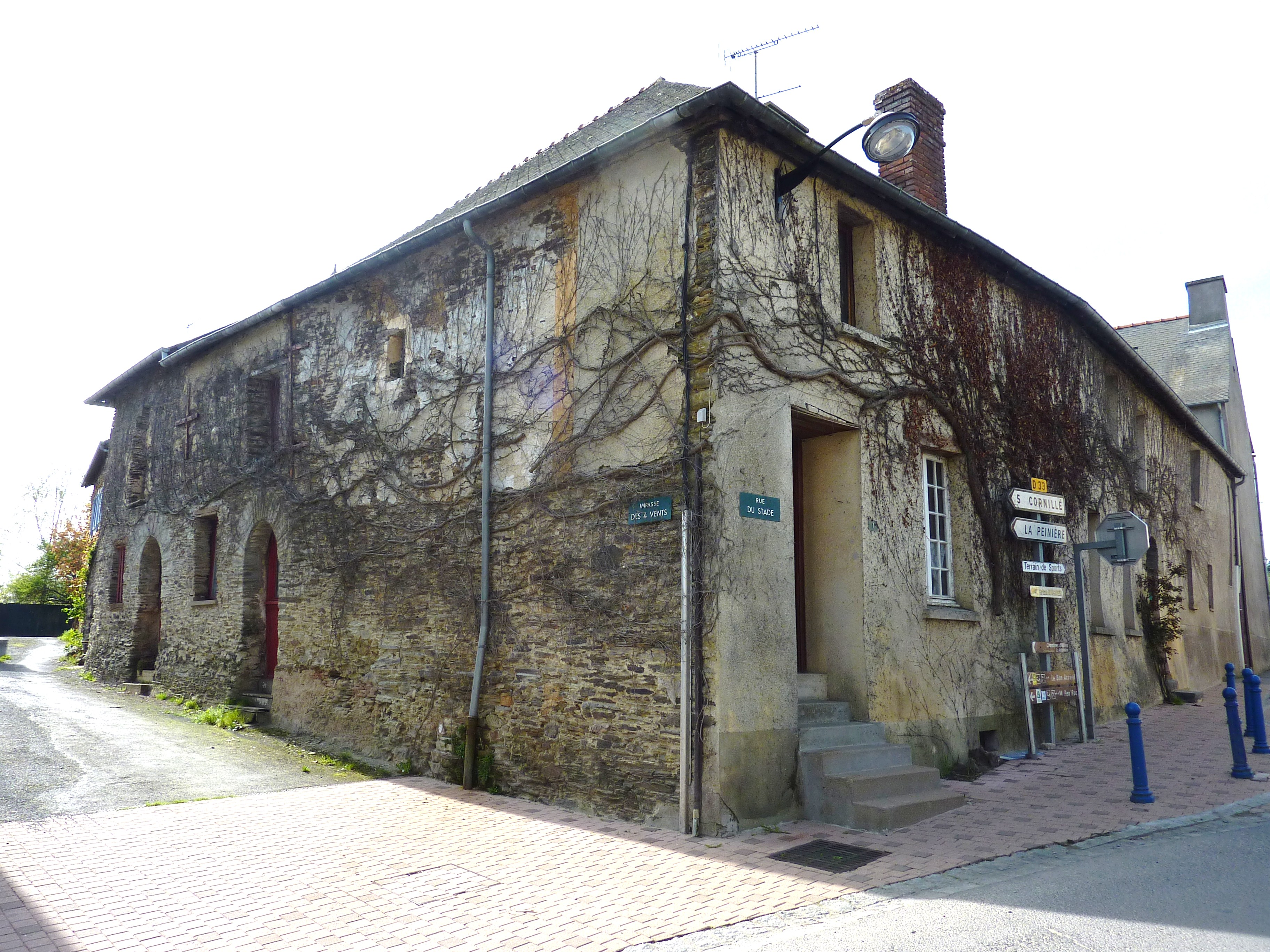 Saint-Didier : la maison probablement la plus ancienne du bourg : elle daterait du XVIIe siècle